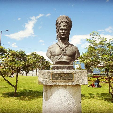 Busto del líder indígena atlacatl.